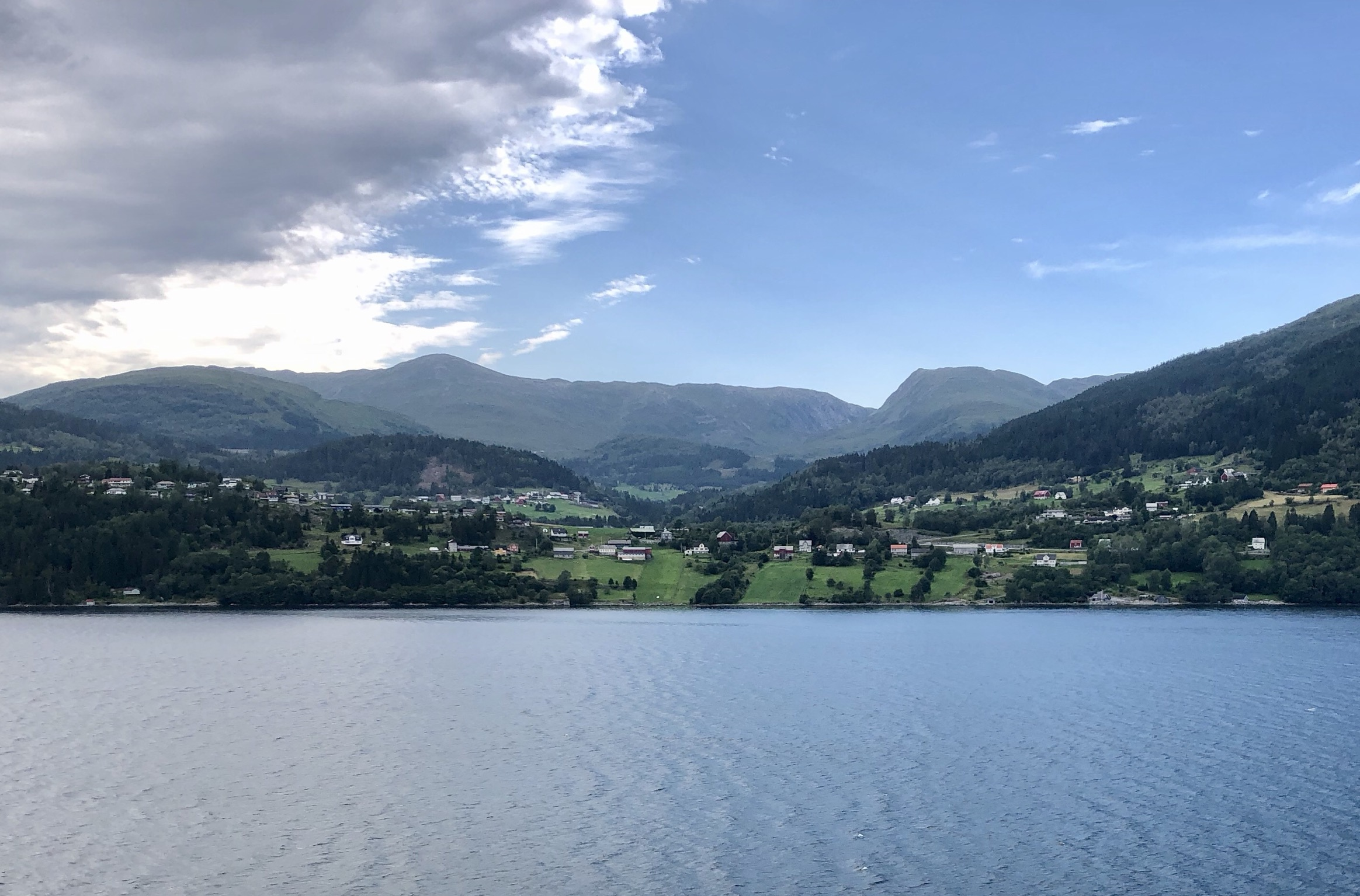 Blick auf Haugen Eid in Norwegen